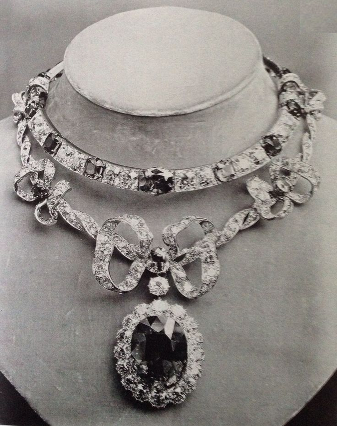 Collier de diamants et saphirs pour Mme Marie-Louise Mackey, exposé à Paris en 1878.